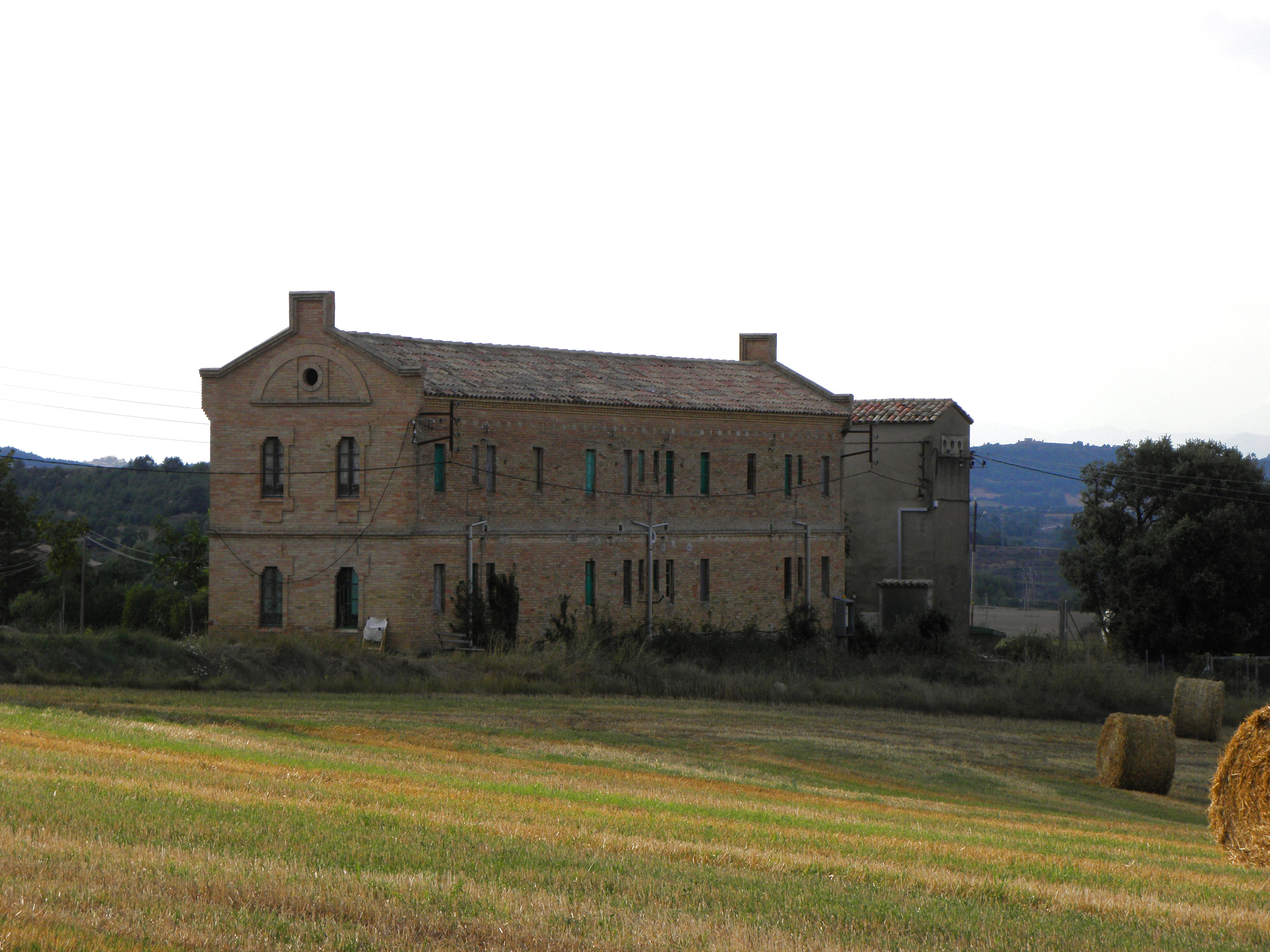 L'edifici de les cel·les de Sant Benet, al Santuari d'El Miracle (Riner, Solsonès) vist des del sud-est